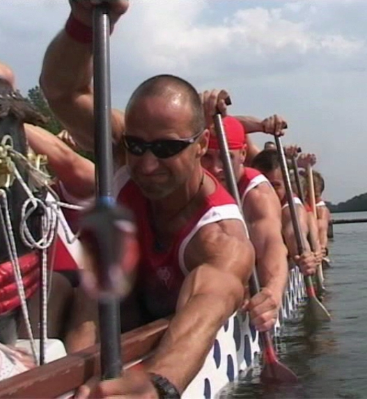 Startfoto Drachenbootrennen